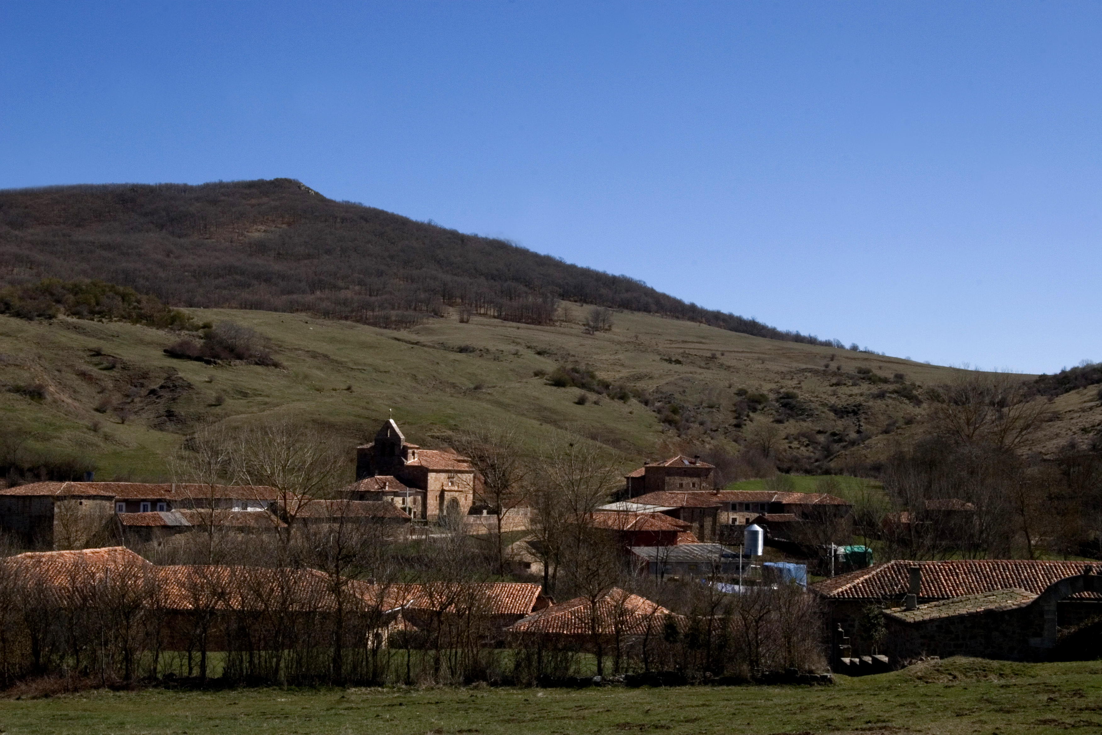 Vista general de la localidad palentina de Bustillo de Santullán.